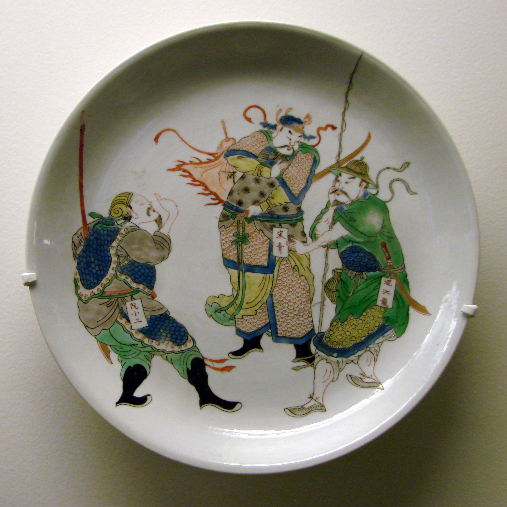 Plat représentant trois héros du roman Au bord de l'eau, écrit sous les Ming: Song Qing, Hunjianglong et Ruan Xiao'er. Dynastie Qing, période Kangxi (1662-1722), 18ème siècle. Musée Guimet, Paris.